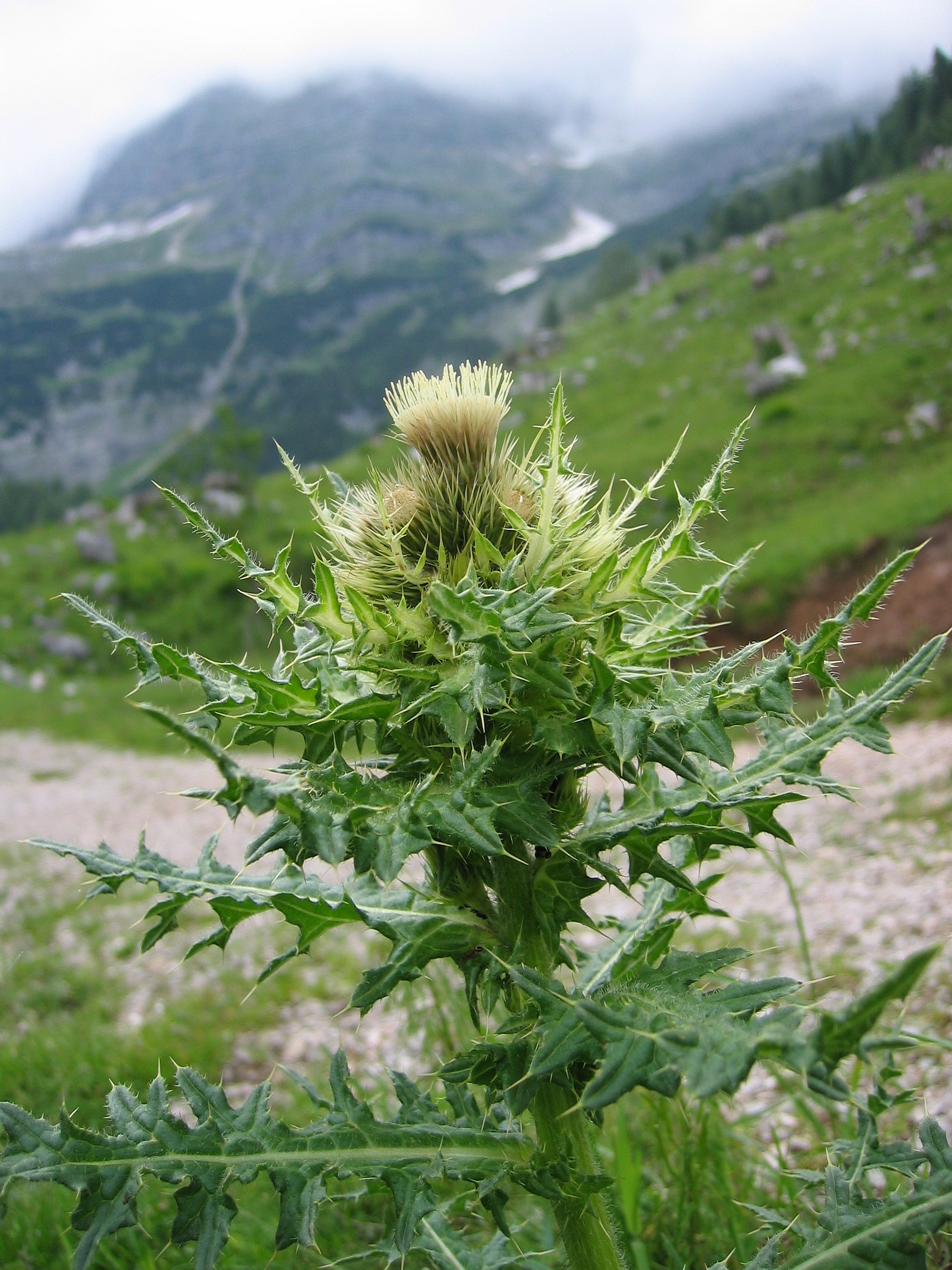 Cirsium spinosissimum,Wurzeralm, Upper Austria, Austria